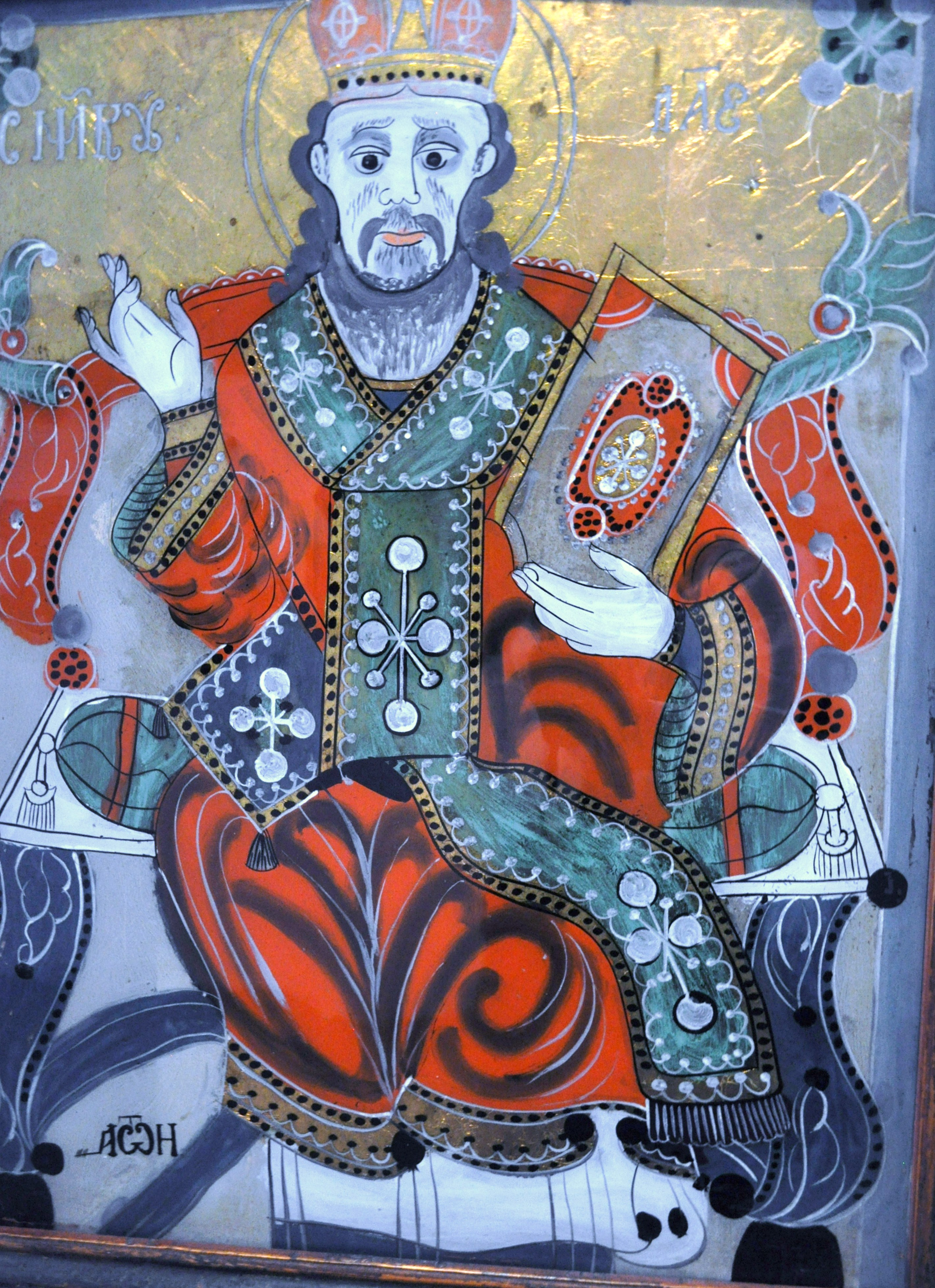 Muzeul de icoane pe sticlă „Pr.Zosim Oancea” din Sibiel